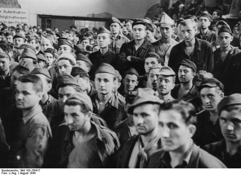 Ausländische Arbeitskräfte, Kundgebung Reichsorganisationsleiter Dr. Ley sprach zu ausländischen Arbeitern UBz: Blick in die Reihen der ausländischen Zuhörer. 26.8.44 951-44 [Deutschland.- Robert Ley in einem deutschen Rüstungsbetrieb vor ausländischen Arbeitern]